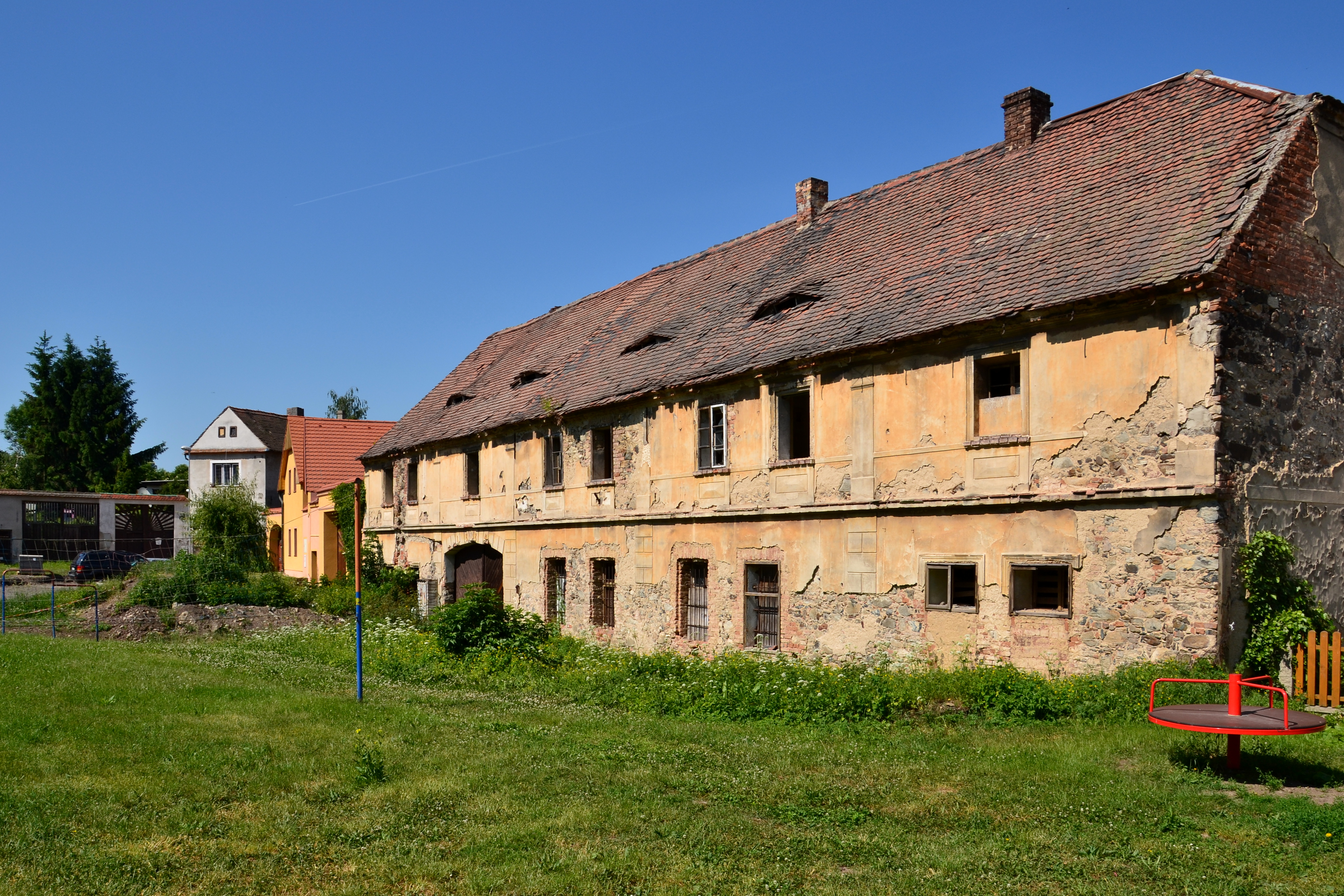 Usedlost čp. 15